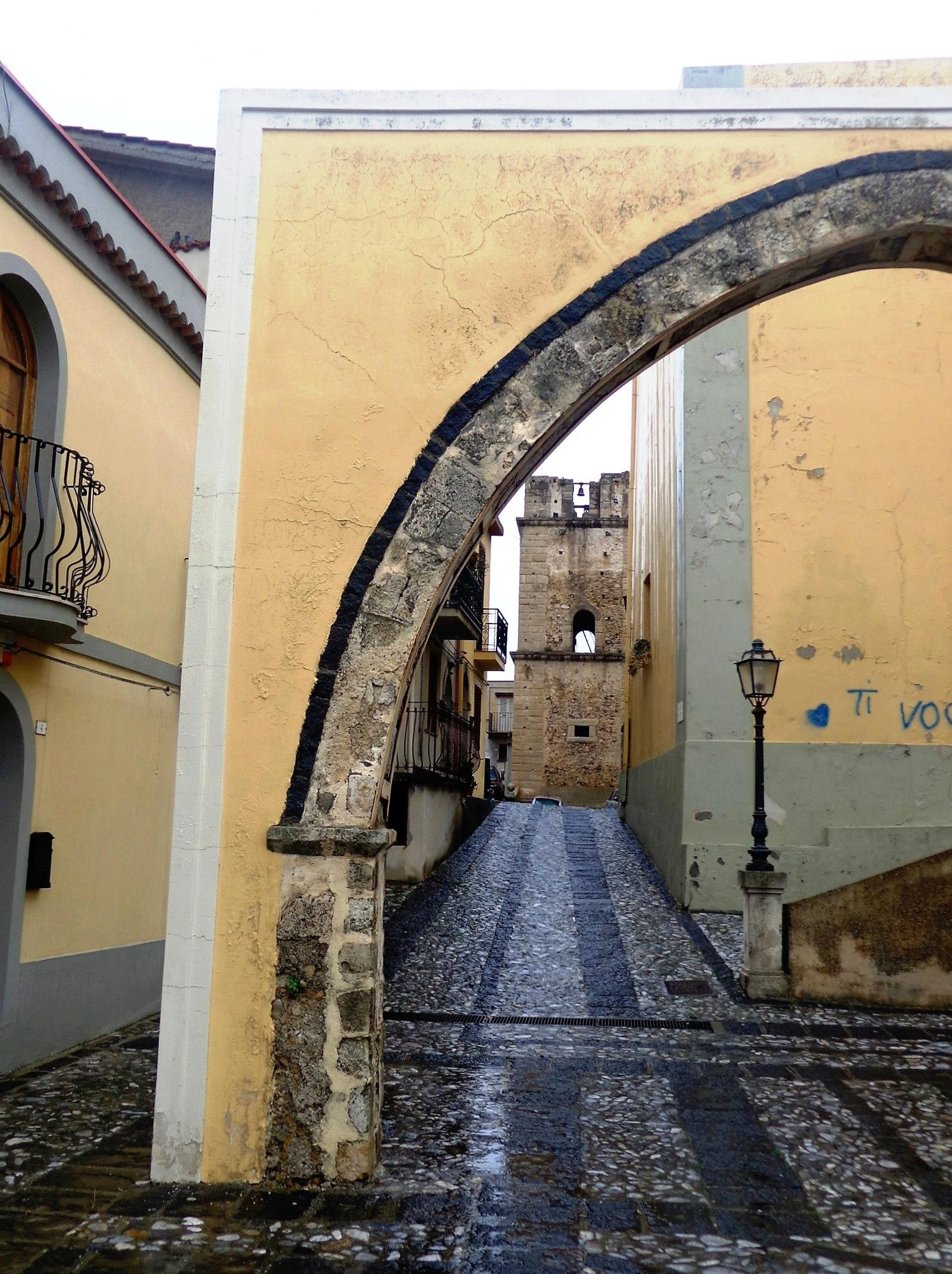 Arco sinagoga